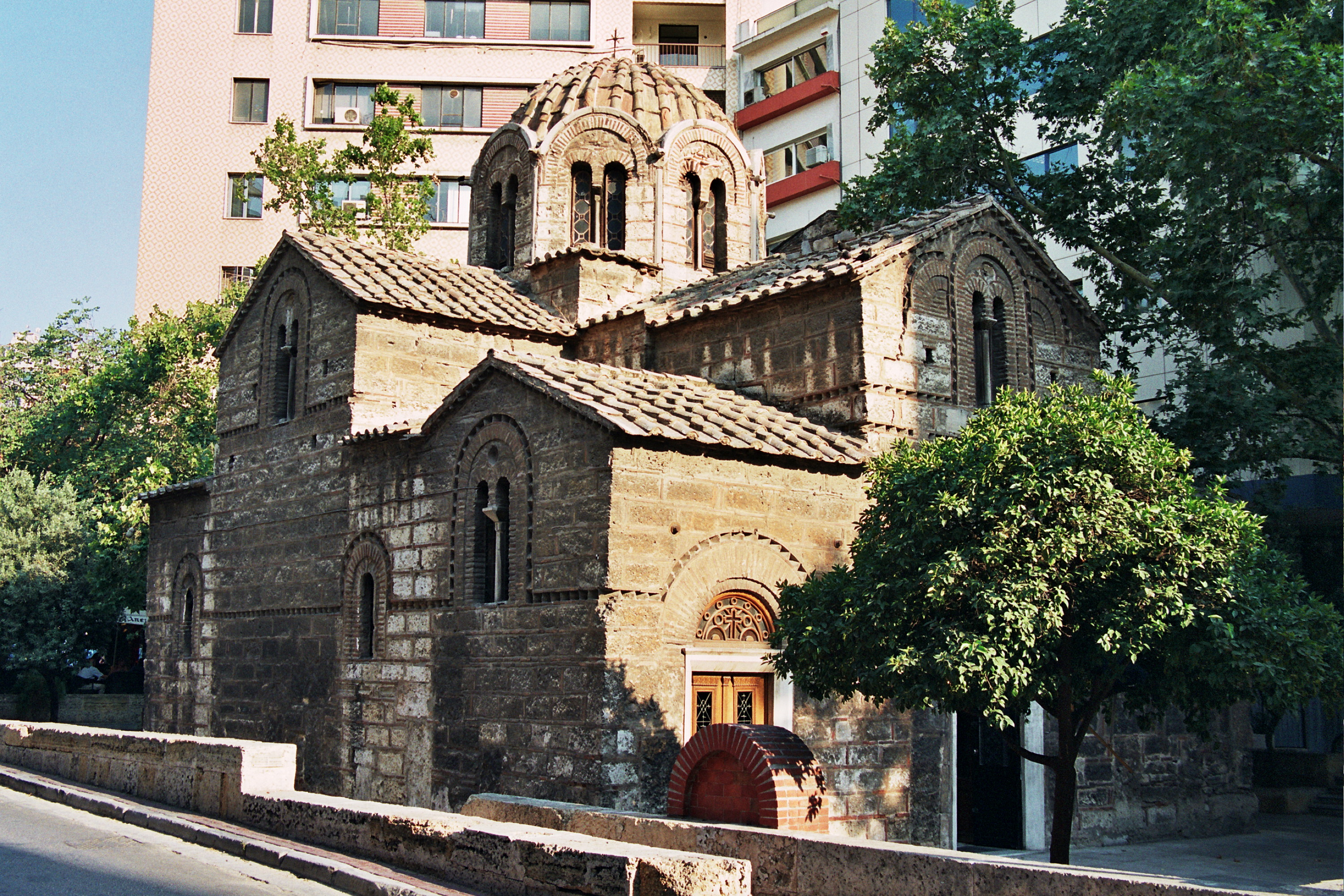 St. Theodore Church (Athens) Церковь Св. Фёдора в Афинах Εκκλησία του Αγίου Θεοδώρου